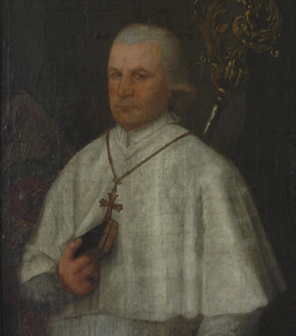 Abt Gilbert Surges (1734 – 1822)